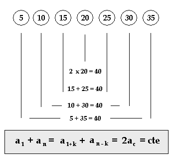 Author: Francisco Javier Blanco González Spain Made by Paint and x2y En una progresión aritmética la suma de los extremos es igual a la de dos términos equidistantes de ellos.